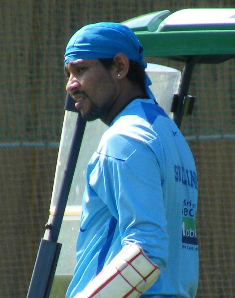 Sri Lankan Cricketer Tillakaratne Dilshan.